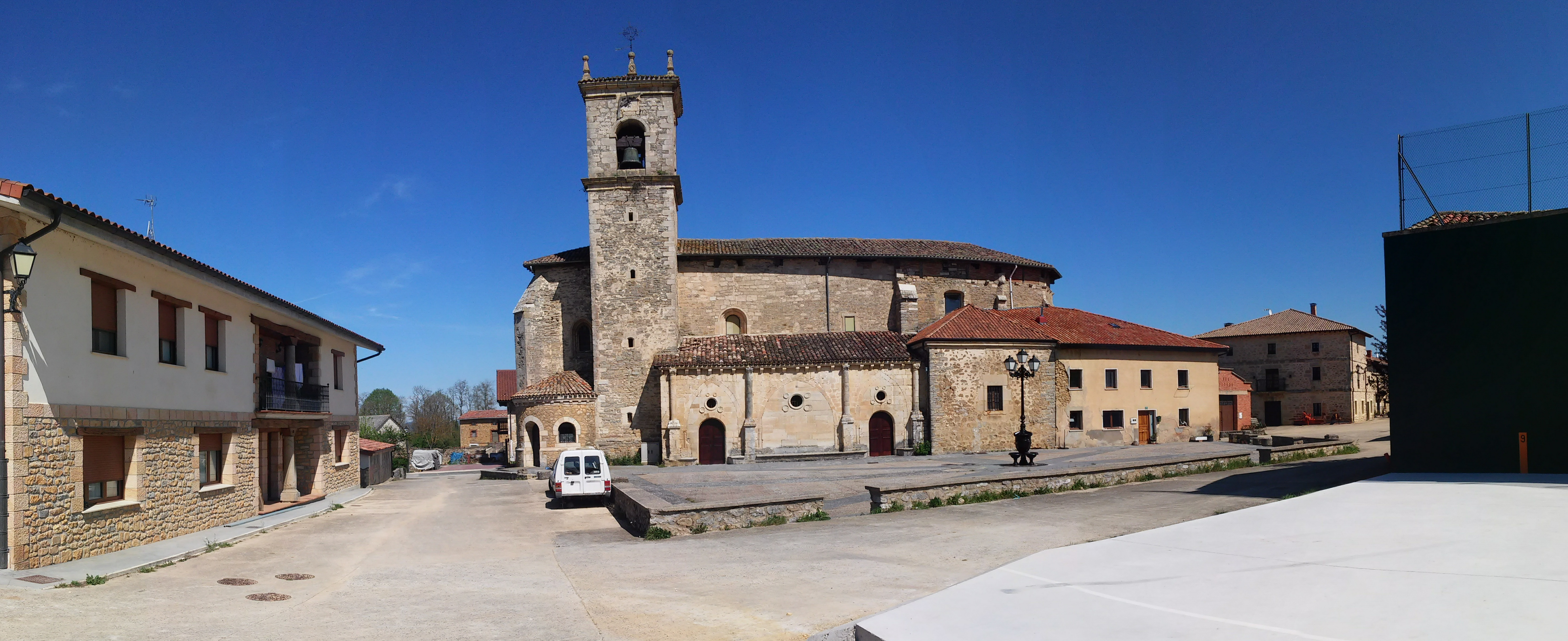 Erentxungo plaza